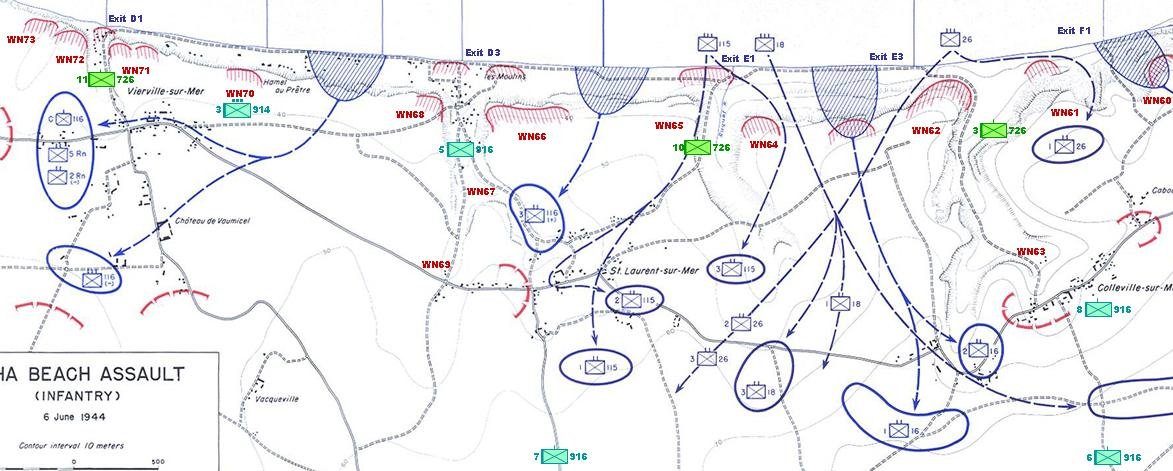 Map